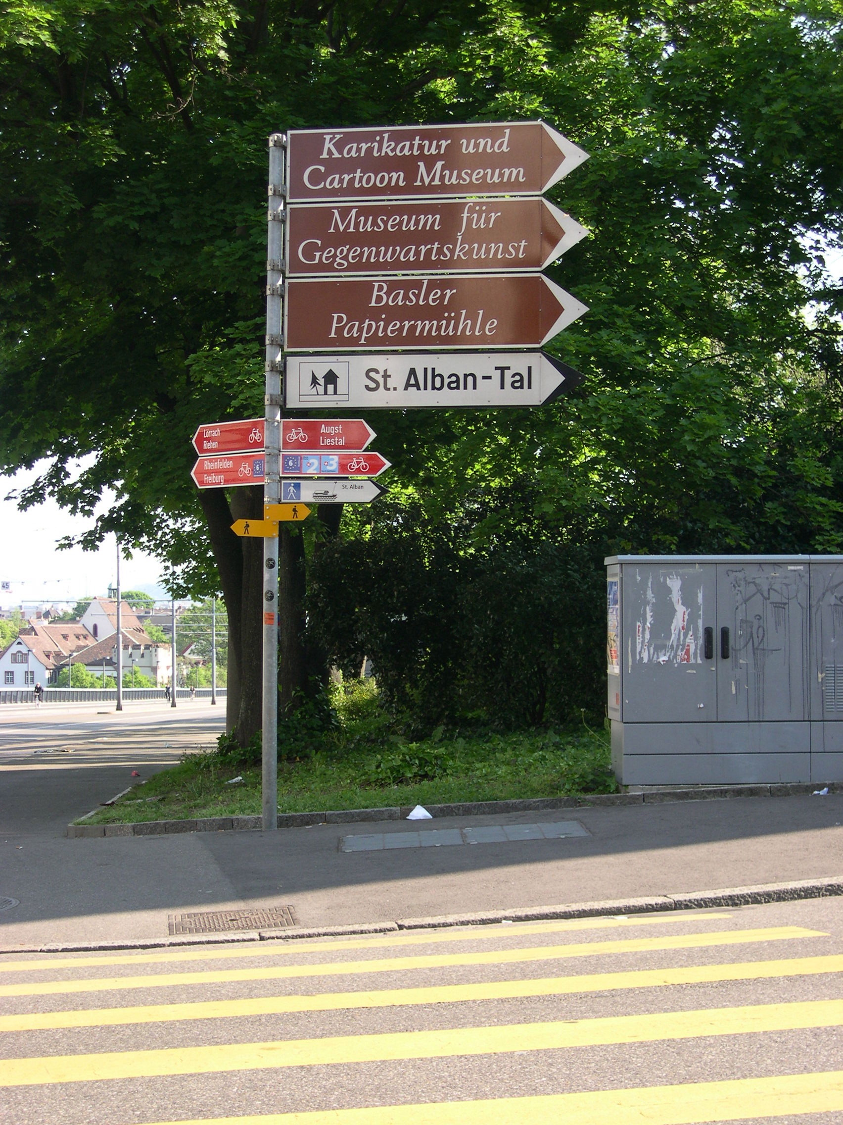 Wegweiser zu Basler Museen, an der Basler St. Alban-Vorstadt.